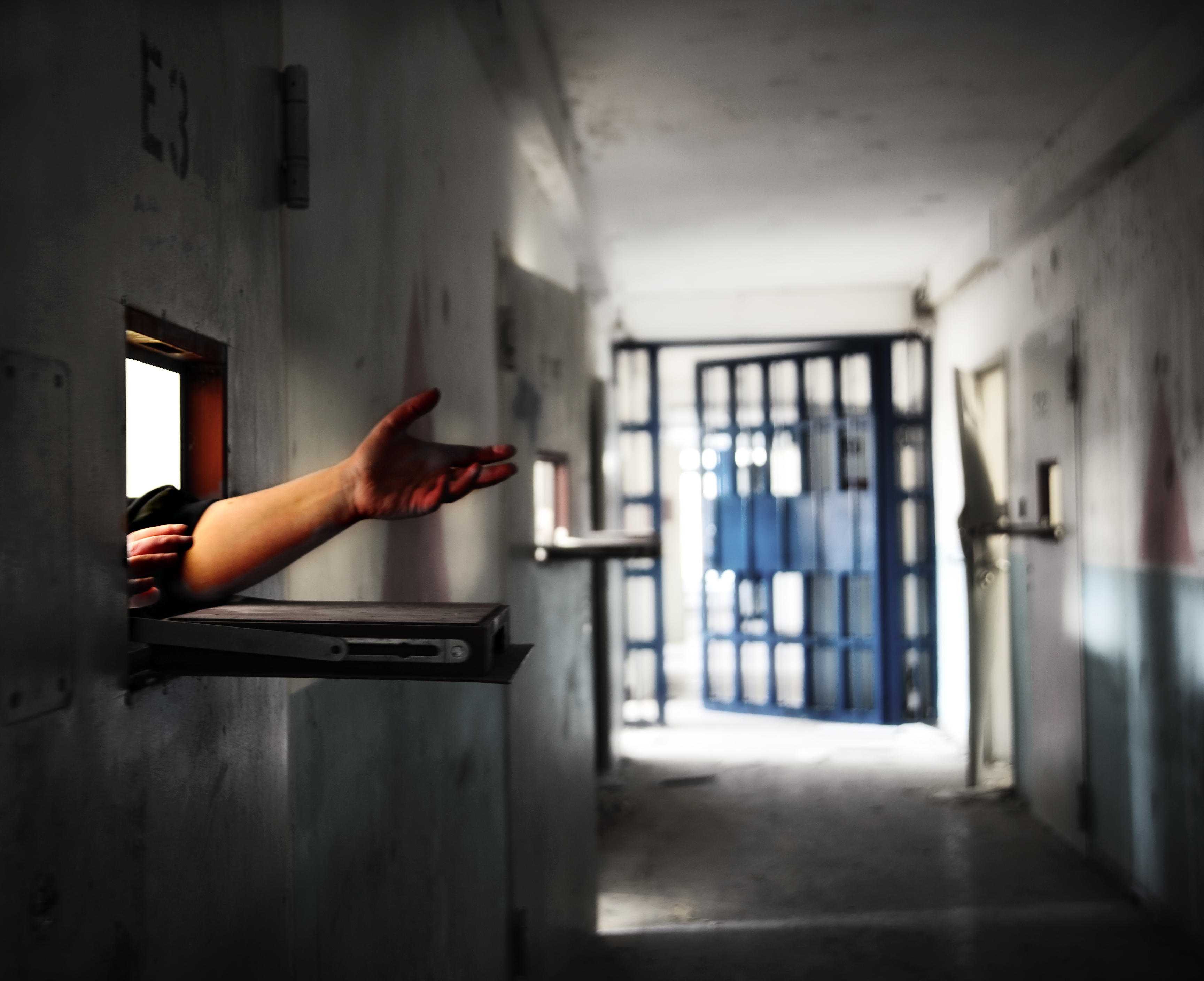 Ehemaliges Abschiebehaftgefängnis in den Birkhausen. Es wurde Ende 2005 geschlossen und ab 2011 abgerissen. ([1])